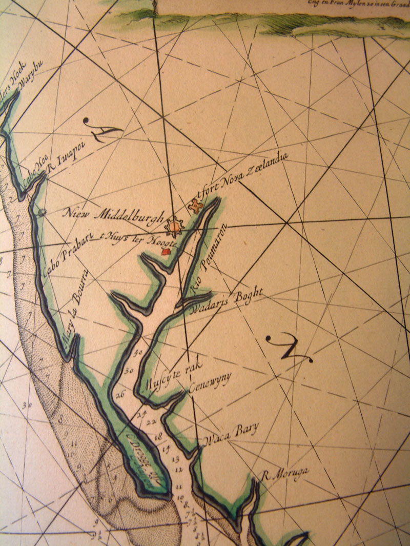 Rivier Pomeroon, uit Van Keulen Atlas uit 1688.